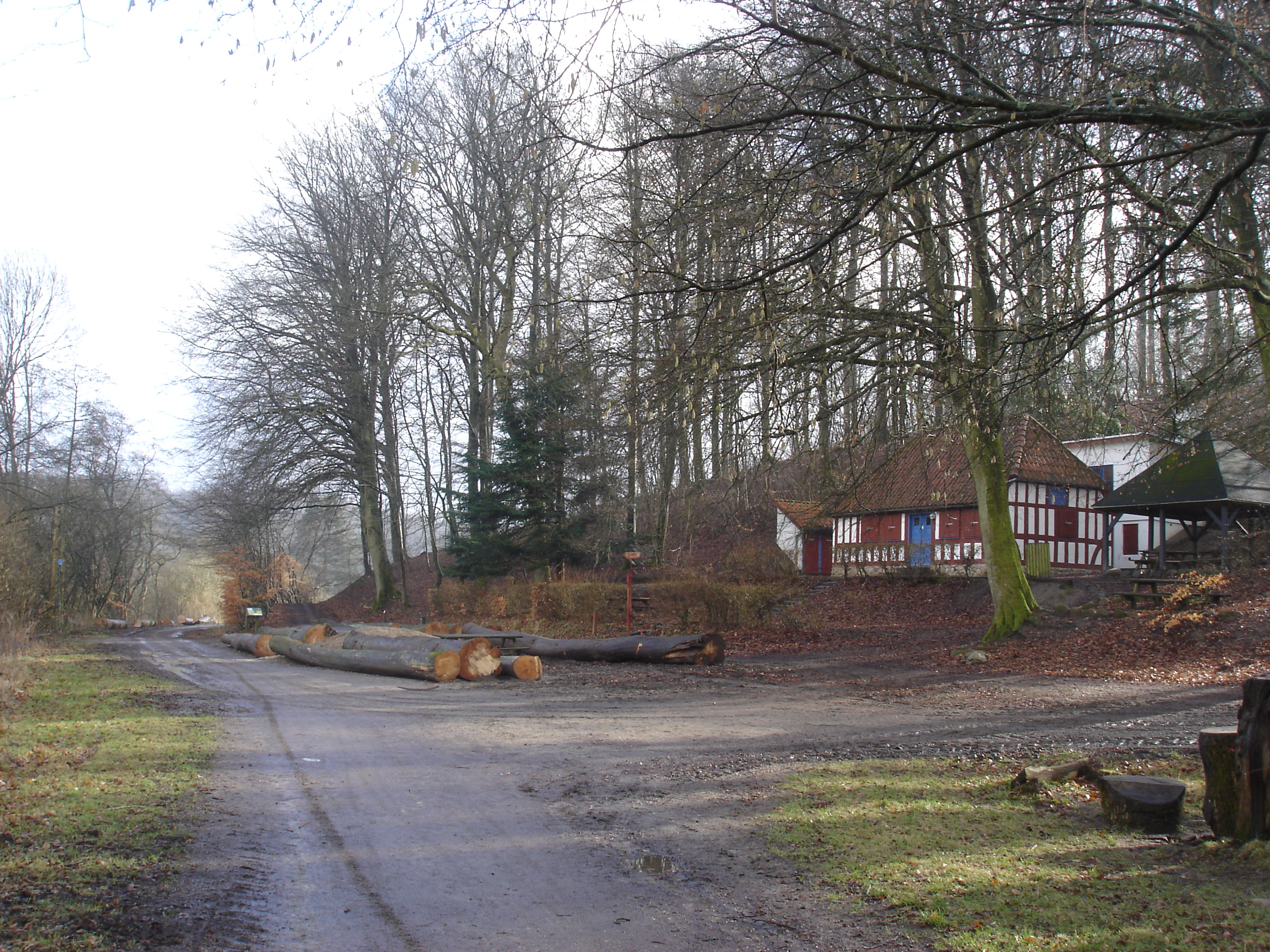 Troldhedebanestien passerer traktørstedet Skovløberhuset, hvor der lå et trinbræt - midt i billedet ses det røde trinbrætsignal